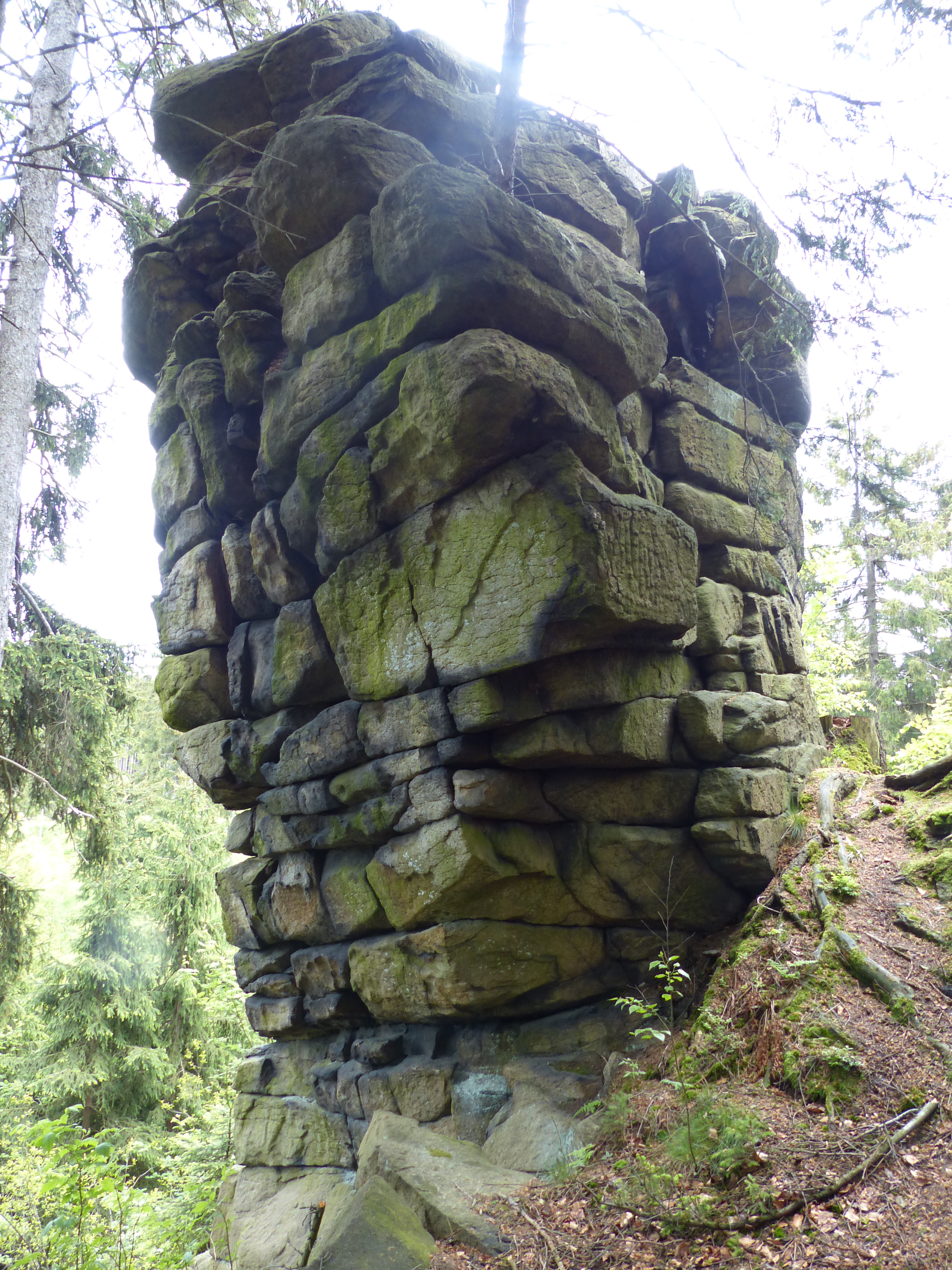 Ruine Hirschstein, Großer Kornberg im Fichtelgebirge